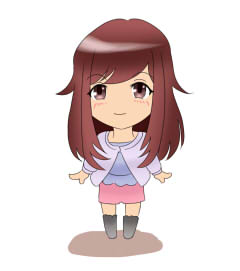 千葉ちずるは、フリーランスのイラストレーターおといちがデザインした。